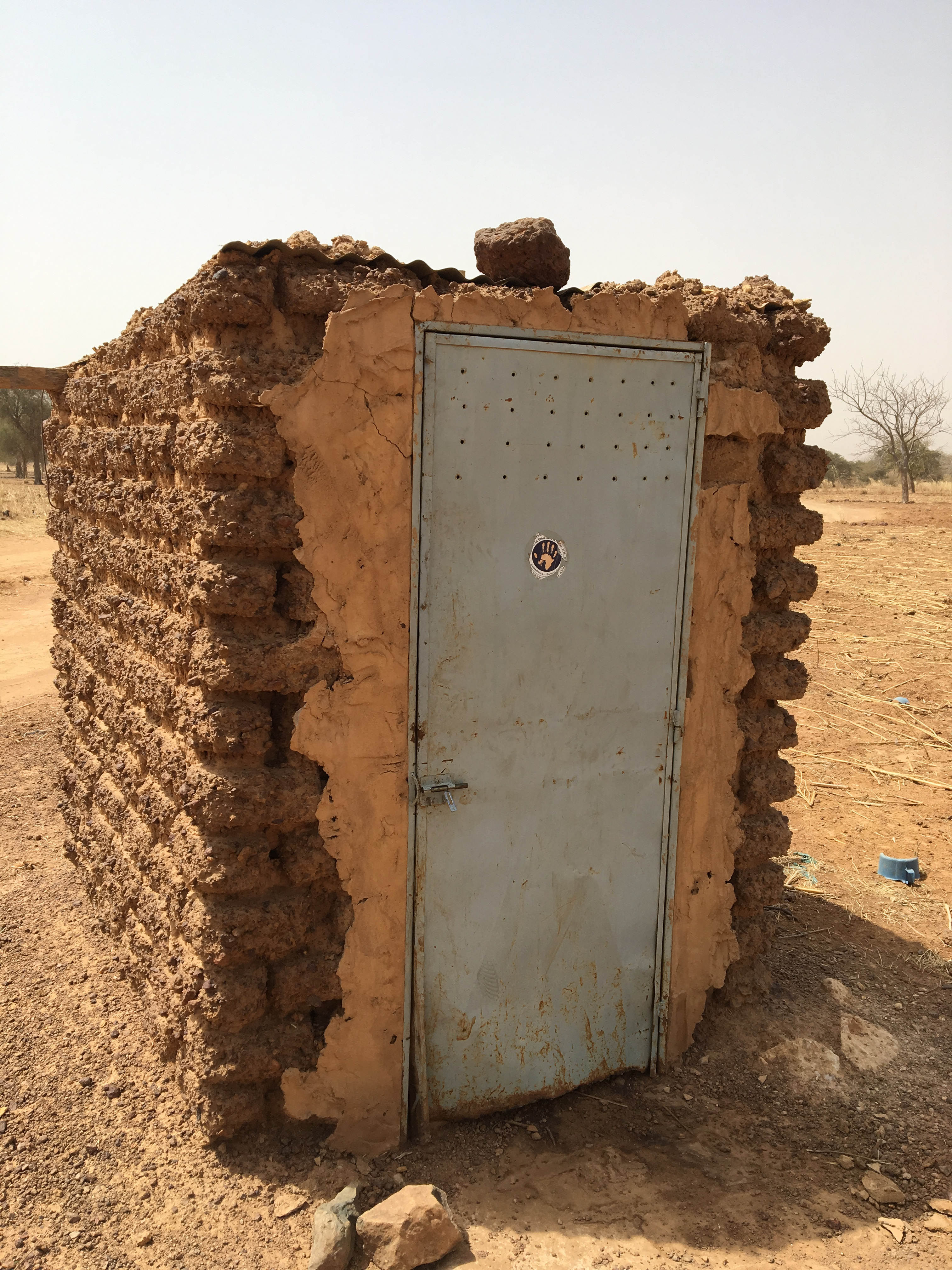 Latrine privée de Rambo-Watinooma